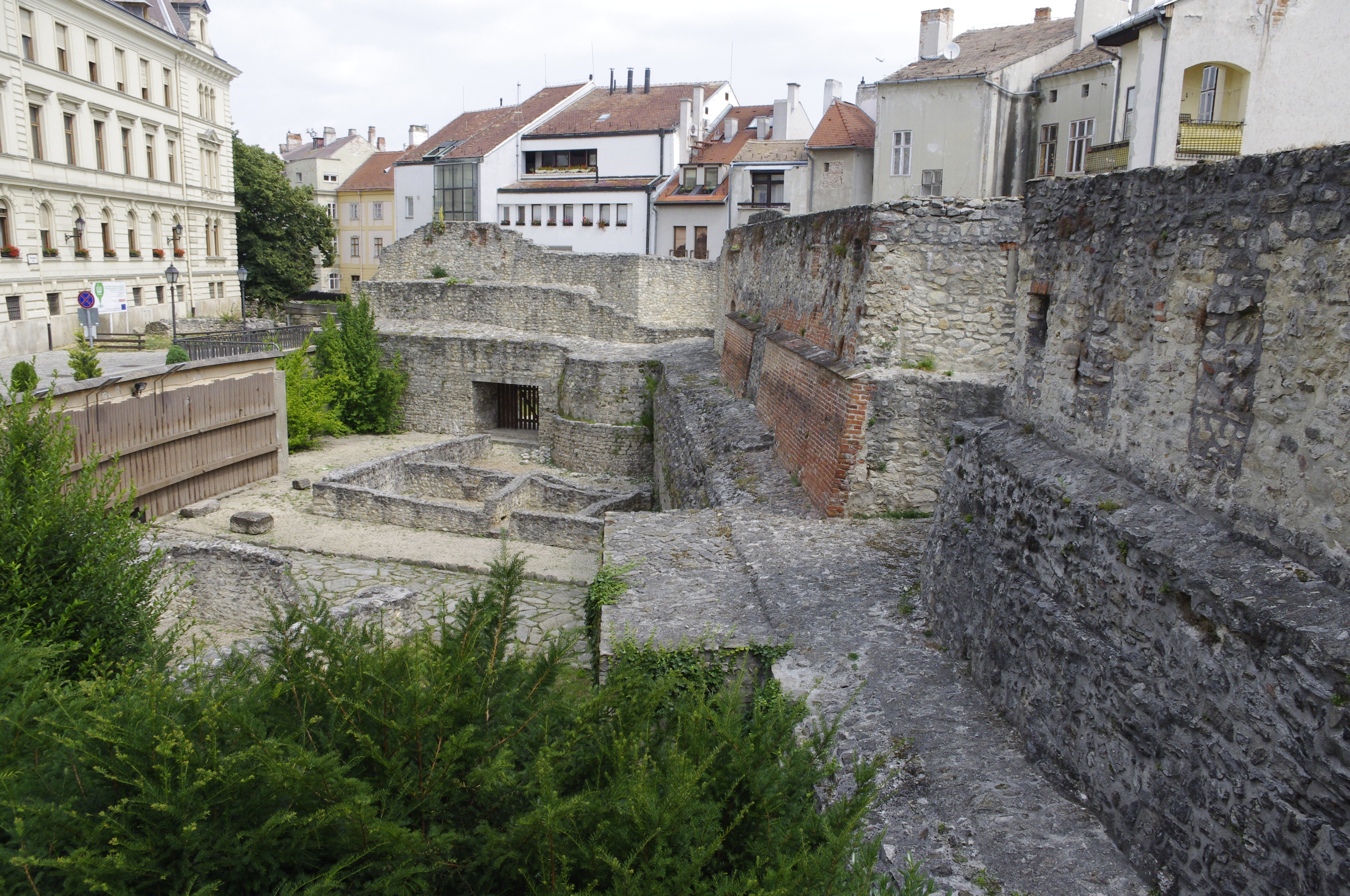 Sopron, Ungarn - Reste der Stadtmauer und Ausgrabungen aus der Römerzeit. This is a photo of a monument in Hungary, Identifier: 5030